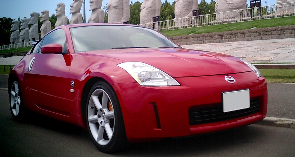 Version S.